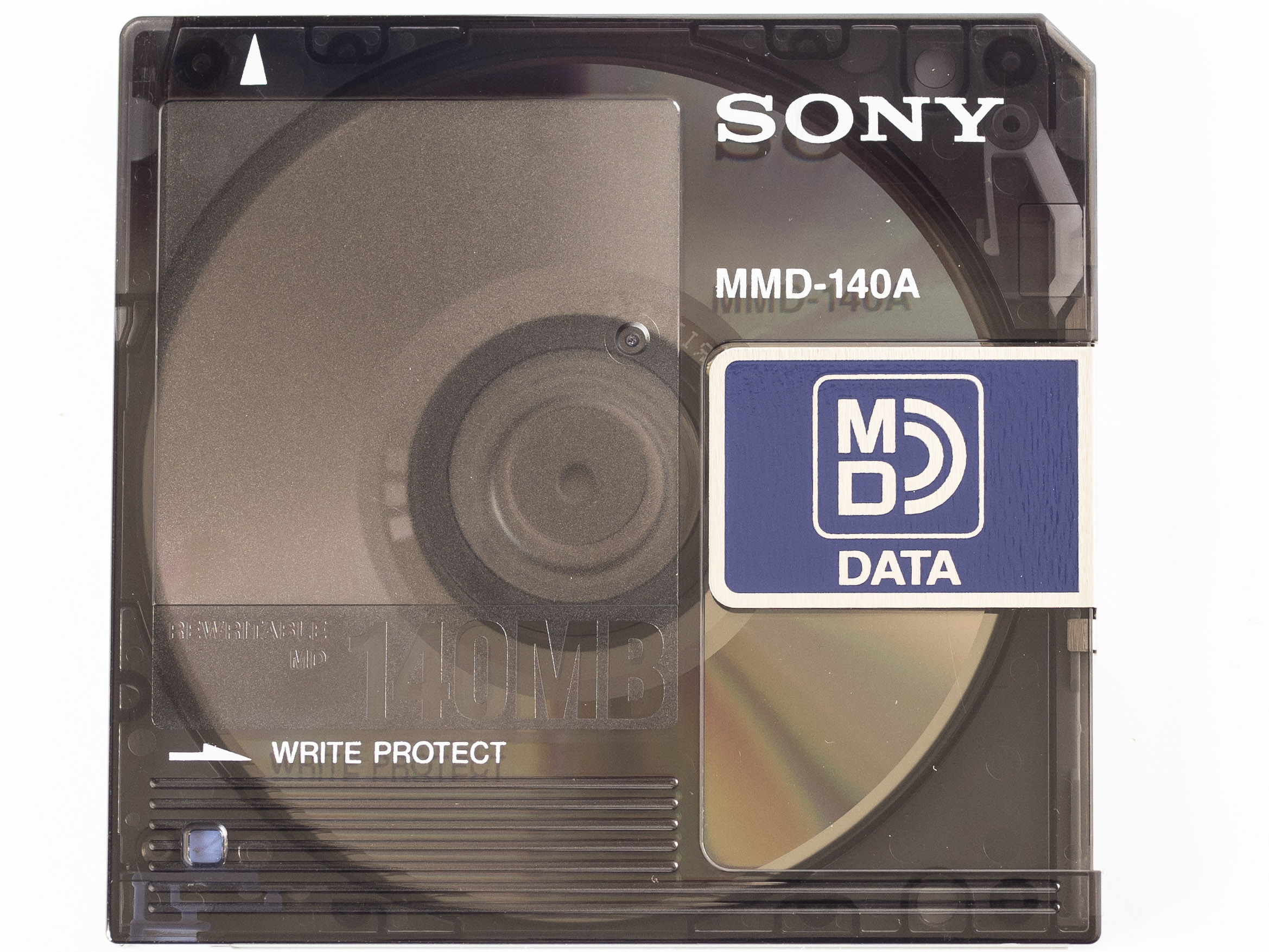 vista frontal de un minidisc tipo MD data